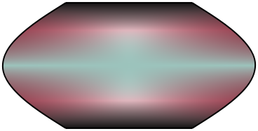 mira zkresleni